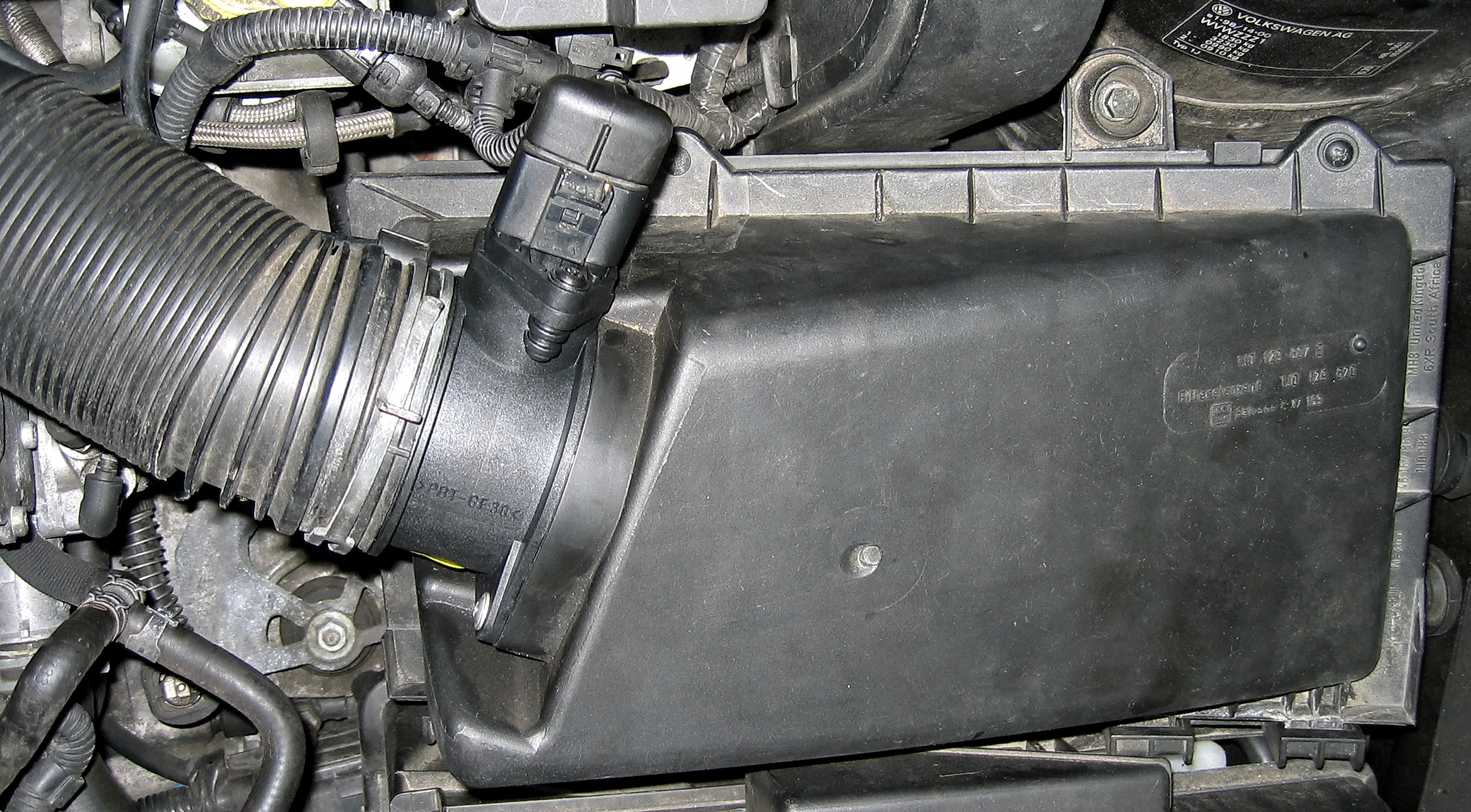 Luftmassenmesser und Luftfilterkasten aus Volkswagen Golf 4 TDI mit 1,9l ARL-Motor. (KFZ EZ 01/2001, 5. Tausch-LMM)